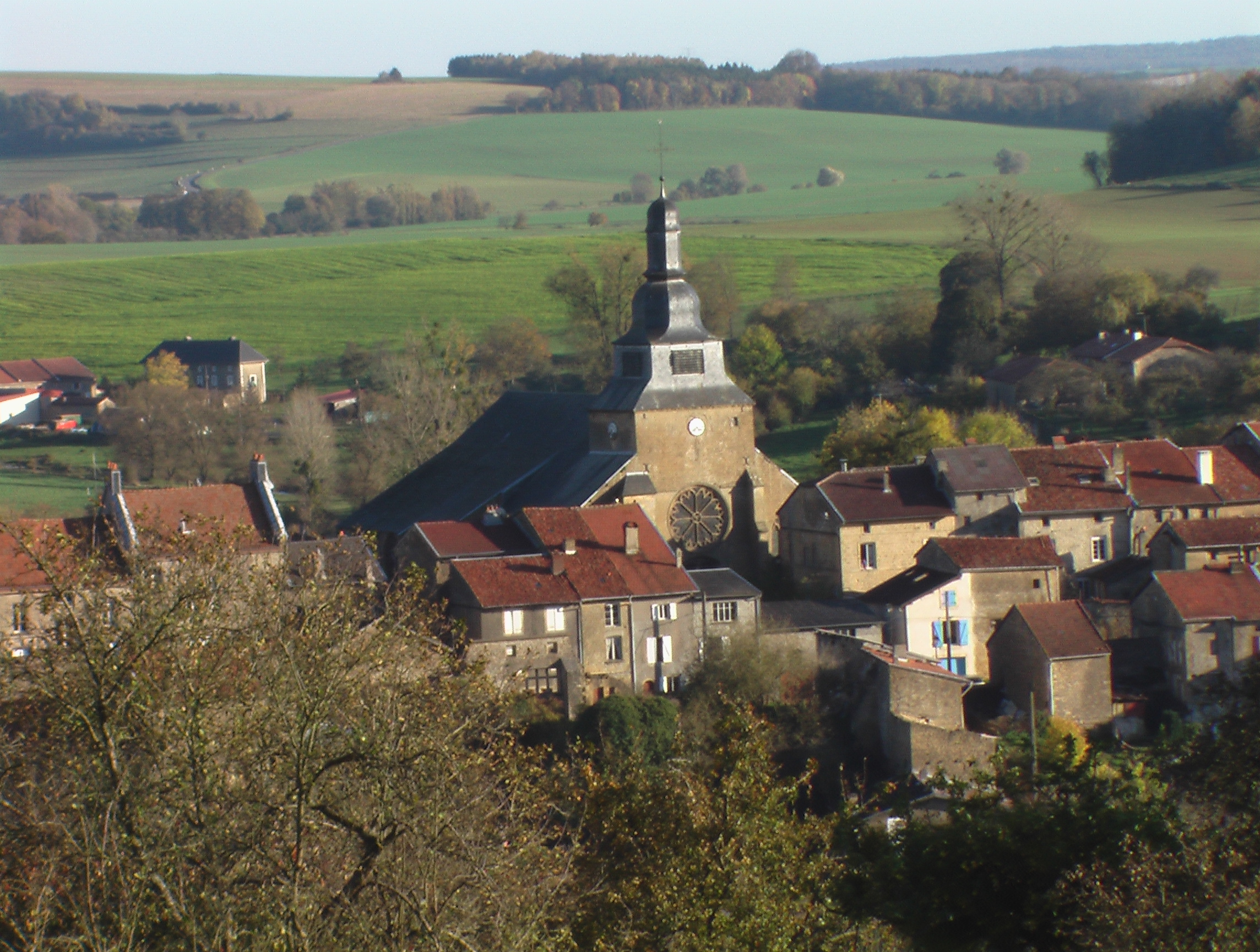 Vue de Marville